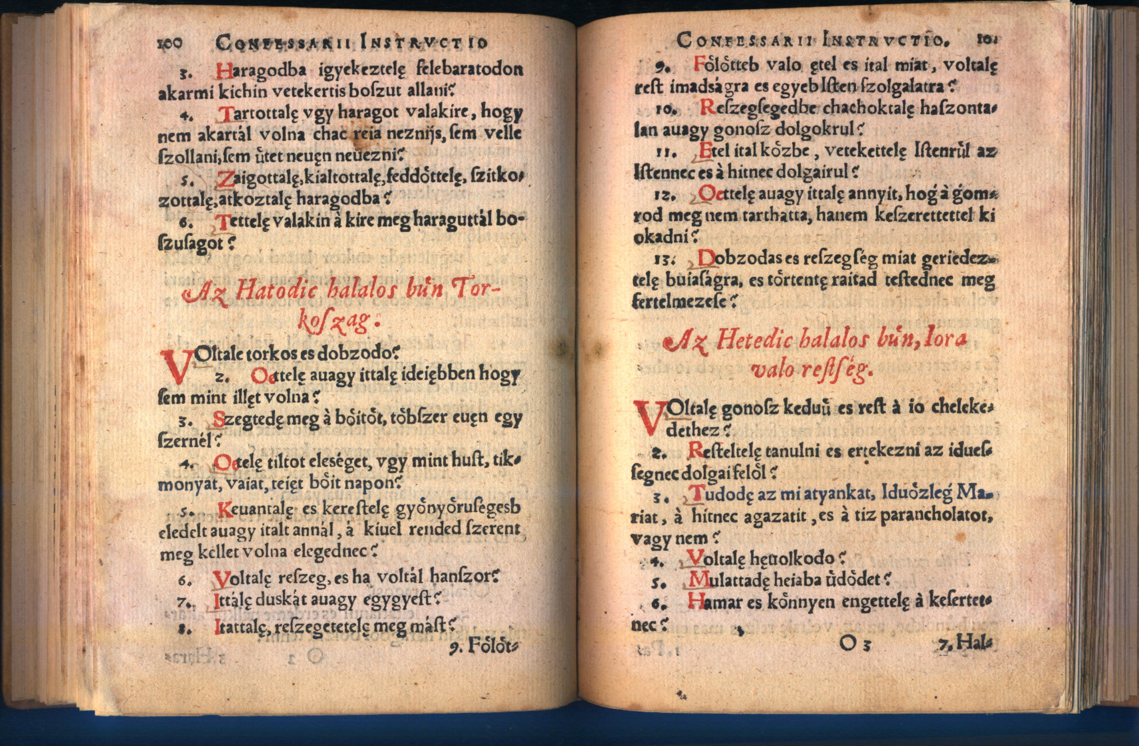 Telegdi Miklós Agendájának két oldala